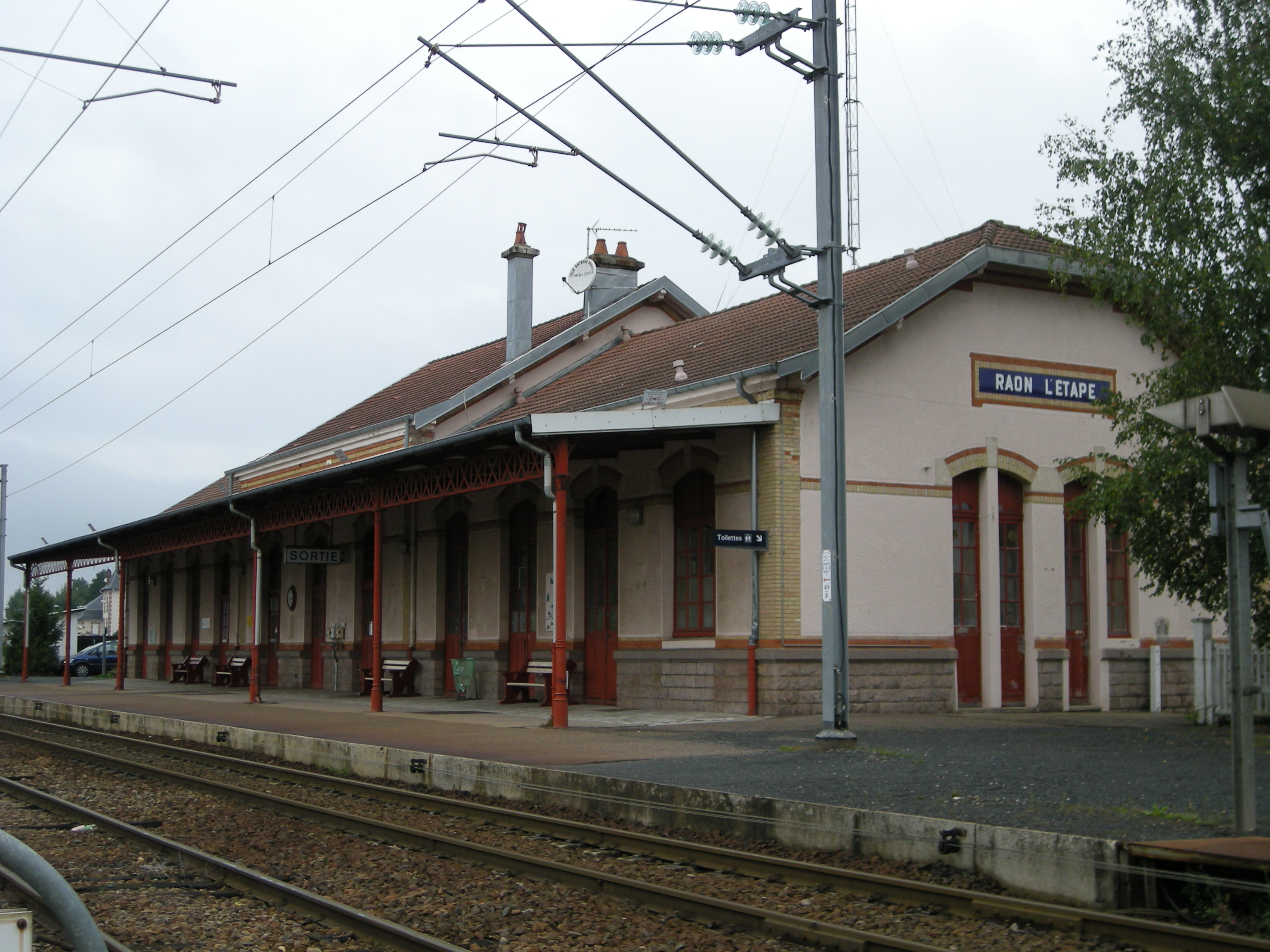 Gare de Raon-l'Etape (Vosges, France)